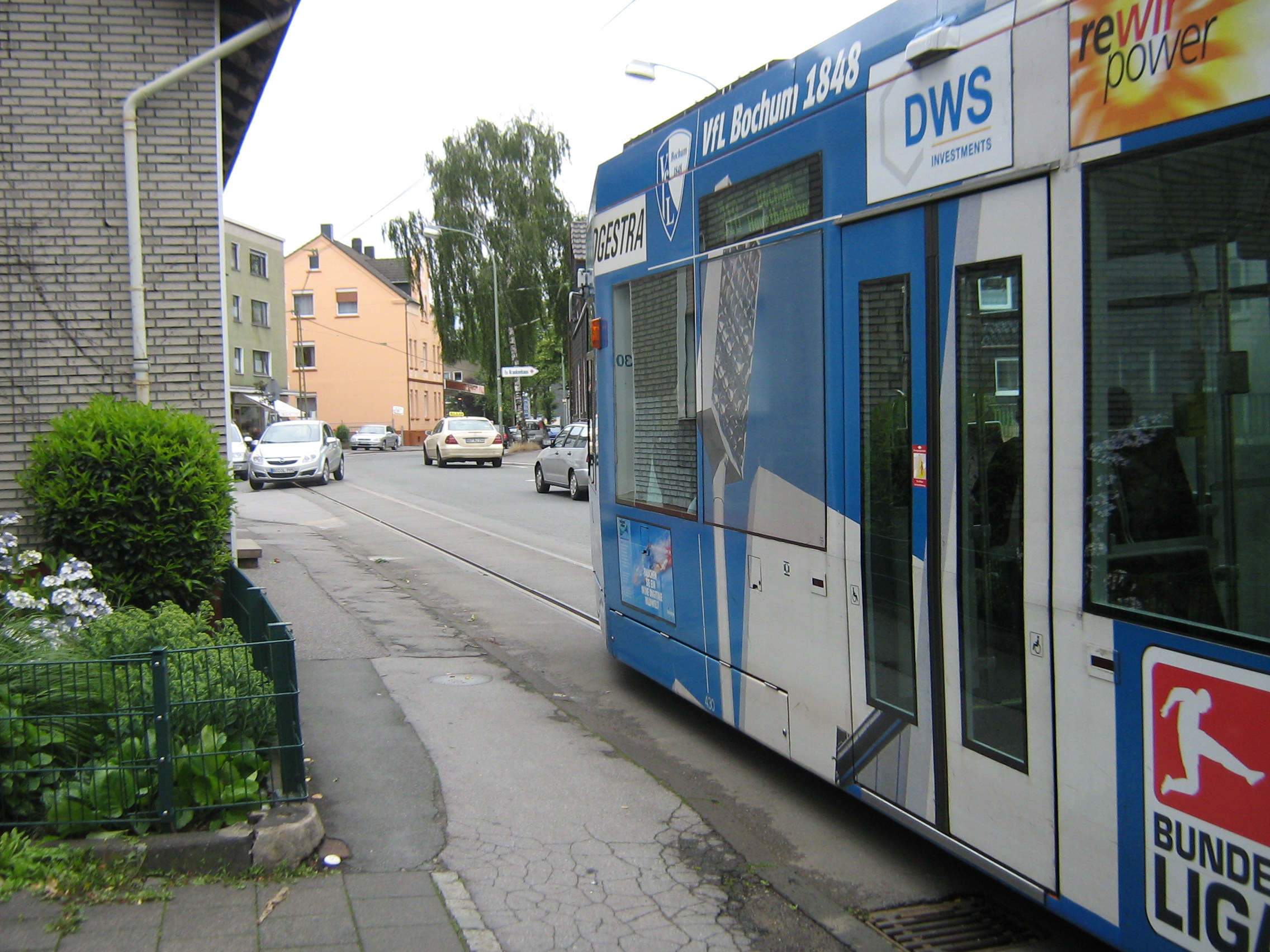 Ein Auto muß einer Straßenbahn in Bochum-Dahlhausen ausweichen